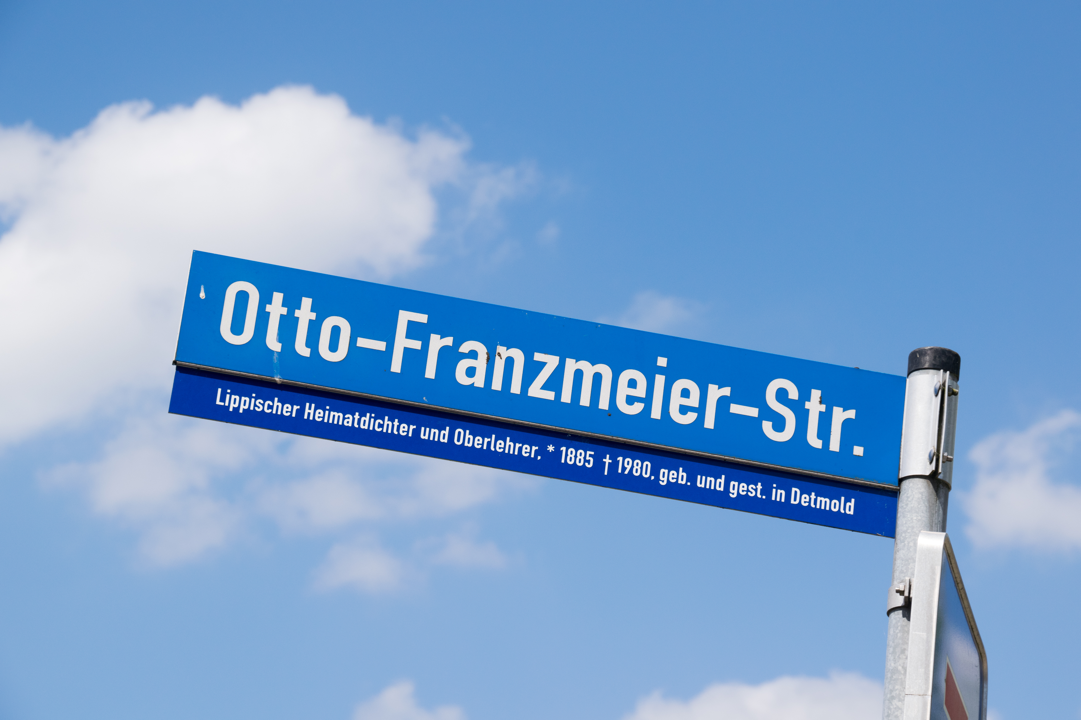 Straßenschild "Otto-Franzmeier-Straße" auf dem Gelände des ehemaligen Fliegerhorstes Detmold